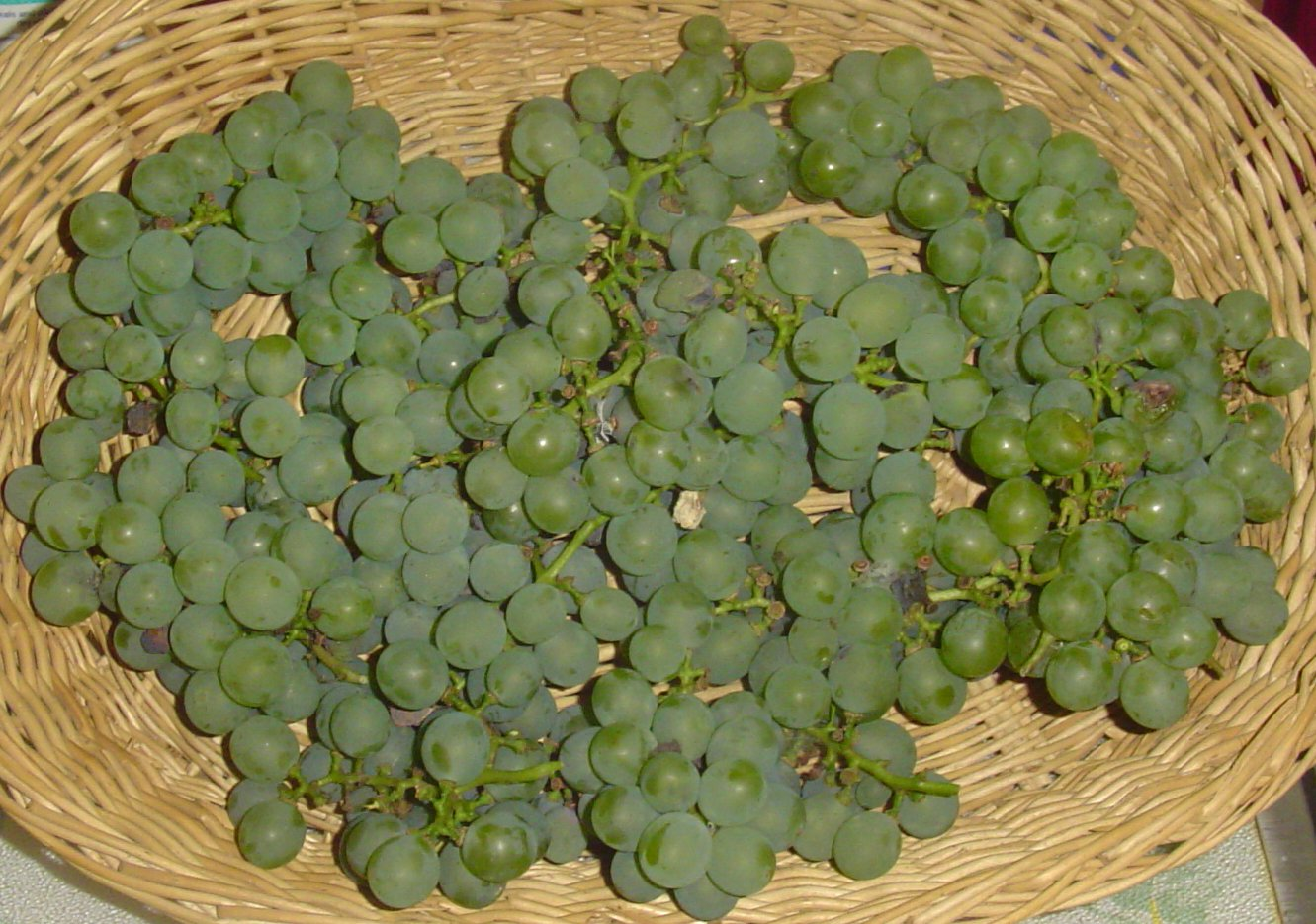 Vitis labrusca Niagara grapes